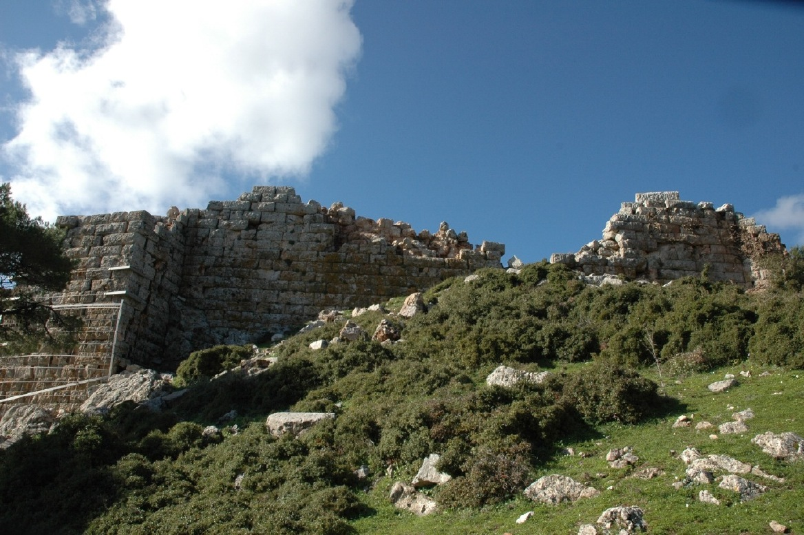 Die Festung Phyle